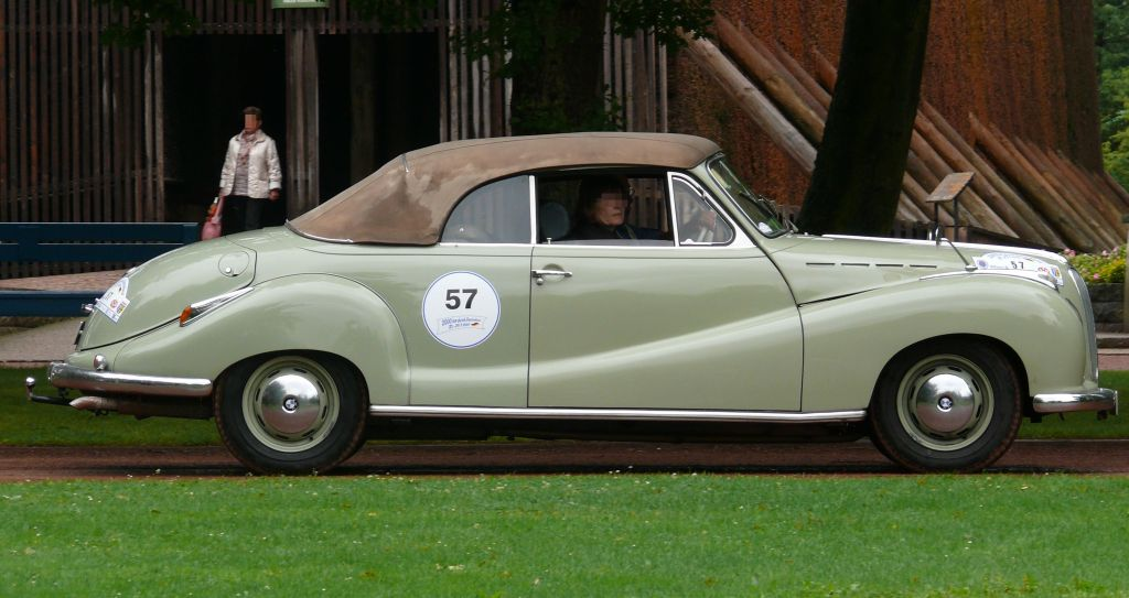 BMW 501 V8 Cabriolet